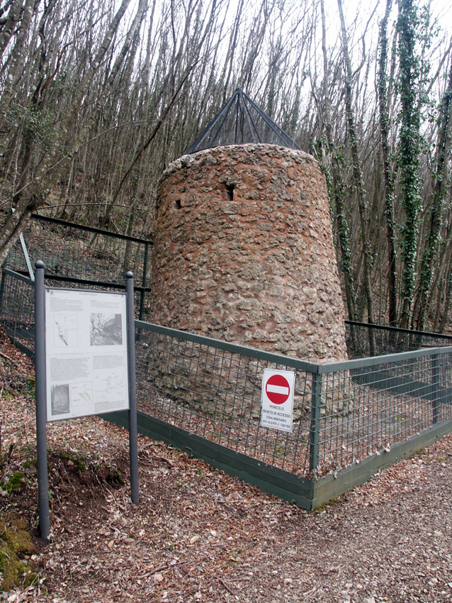 Valle dello Stregaio - Antico Pozzo medievale - Parco Tecnologioc Archeologico delle Colline Metallifere Grossetane